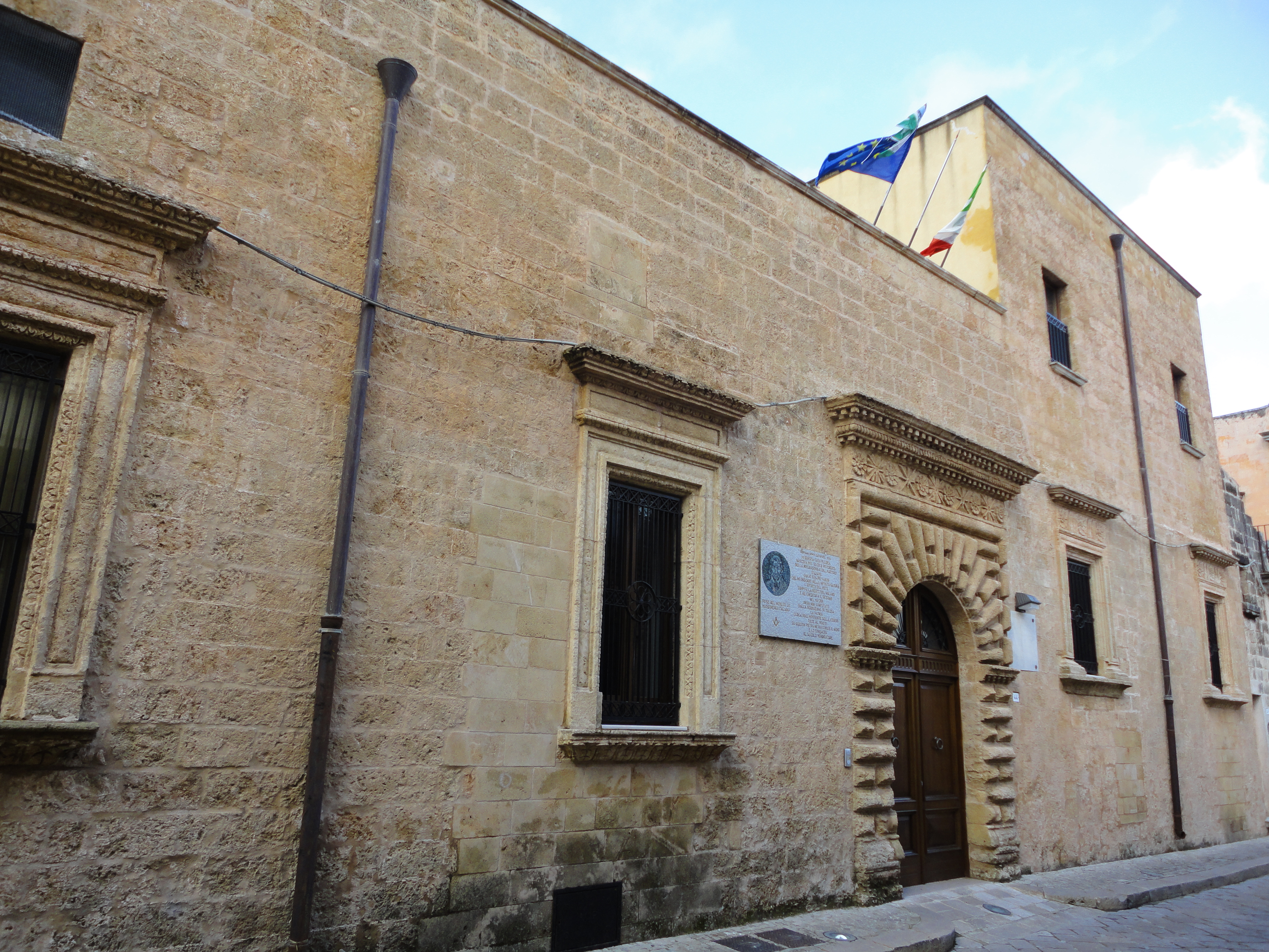 Casa Giulio Cesare Vanini Taurisano, Lecce